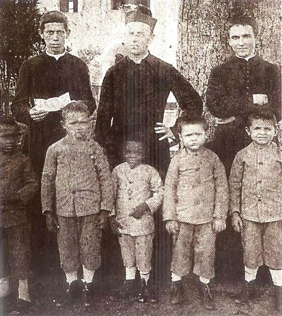 Meninos de Canudos no Colégio Salesiano de Salvador, Bahia, Brasil (c. 1900)